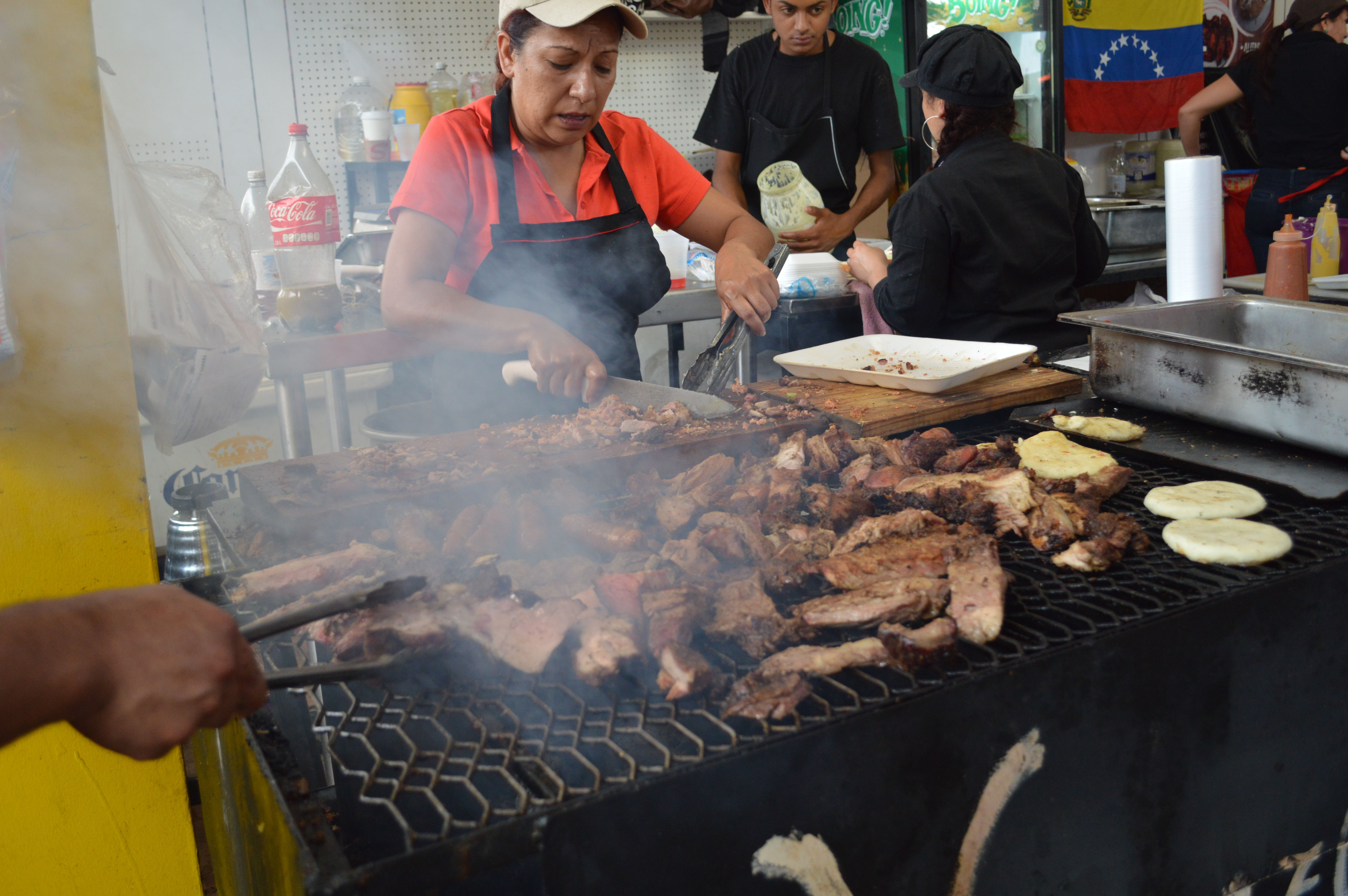 Grilling various meats at the Venezuelan stand at the Feria de la Torta at the Venustiano Carranza borough hall in Mexico City